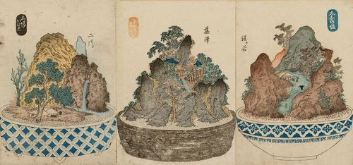 Drei Farbholzschnitte Bonkei der 53 Tōkaidō-Stationen. Drei Buchseiten mit einer Miniaturlandschaft auf einem Tablett von Utagawa Yoshishige. Beschnitten, partiell mit Klebeband als Triptychon befestigt. Japan, 1848, 17x12 cm.